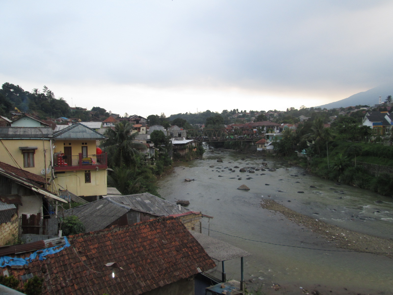 Sungai Cisadane di dekat Stasiun Batutulis